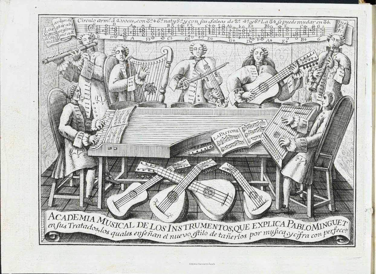 Pablo Minguet: anteportada de "Reglas y advertencias generales que enseñan el modo de tañer todos los instrumentos mejores y mas usuales...", en Madrid, por Joaquín Ibarra, 1754. Inscripción: "Academia musical de los istrumentos que explica Pablo Minguet en sus tratados, los quales enseñan el nuevo estilo de tañerlos por musica, y cifra con perfeccn". Biblioteca Nacional de España.